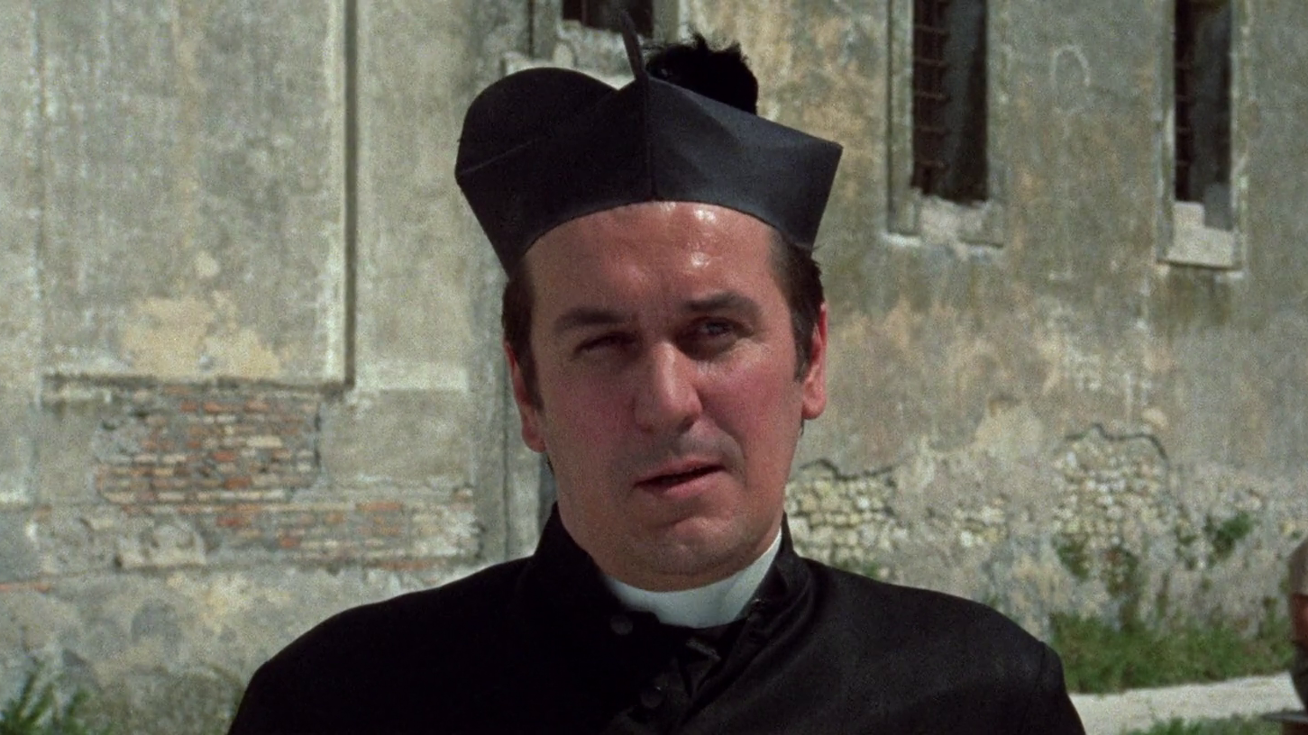 scena dal film Quelli che contano